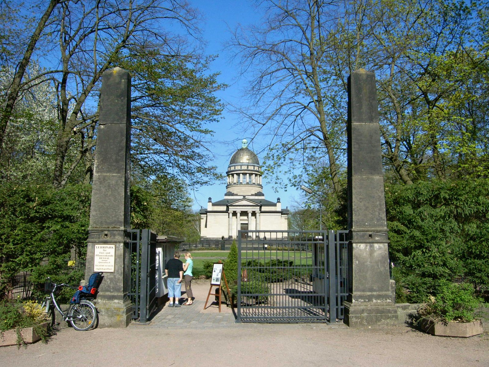 Eingang zum Tierpark Dessau, Mausoleum am Georgium